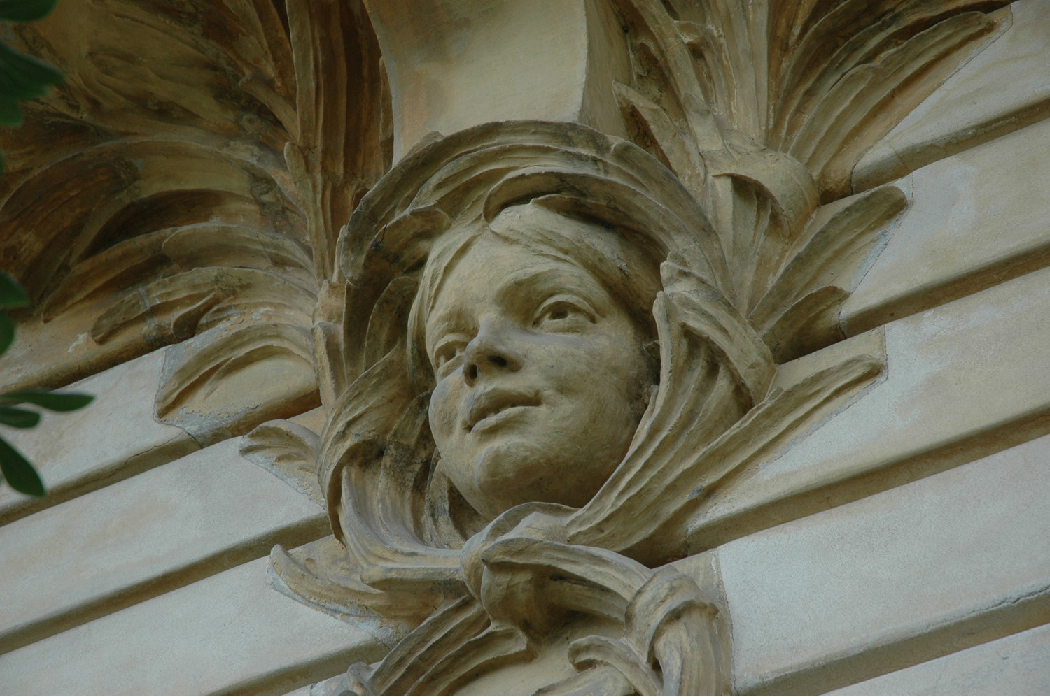 Antic Casino de l'Arrabasada